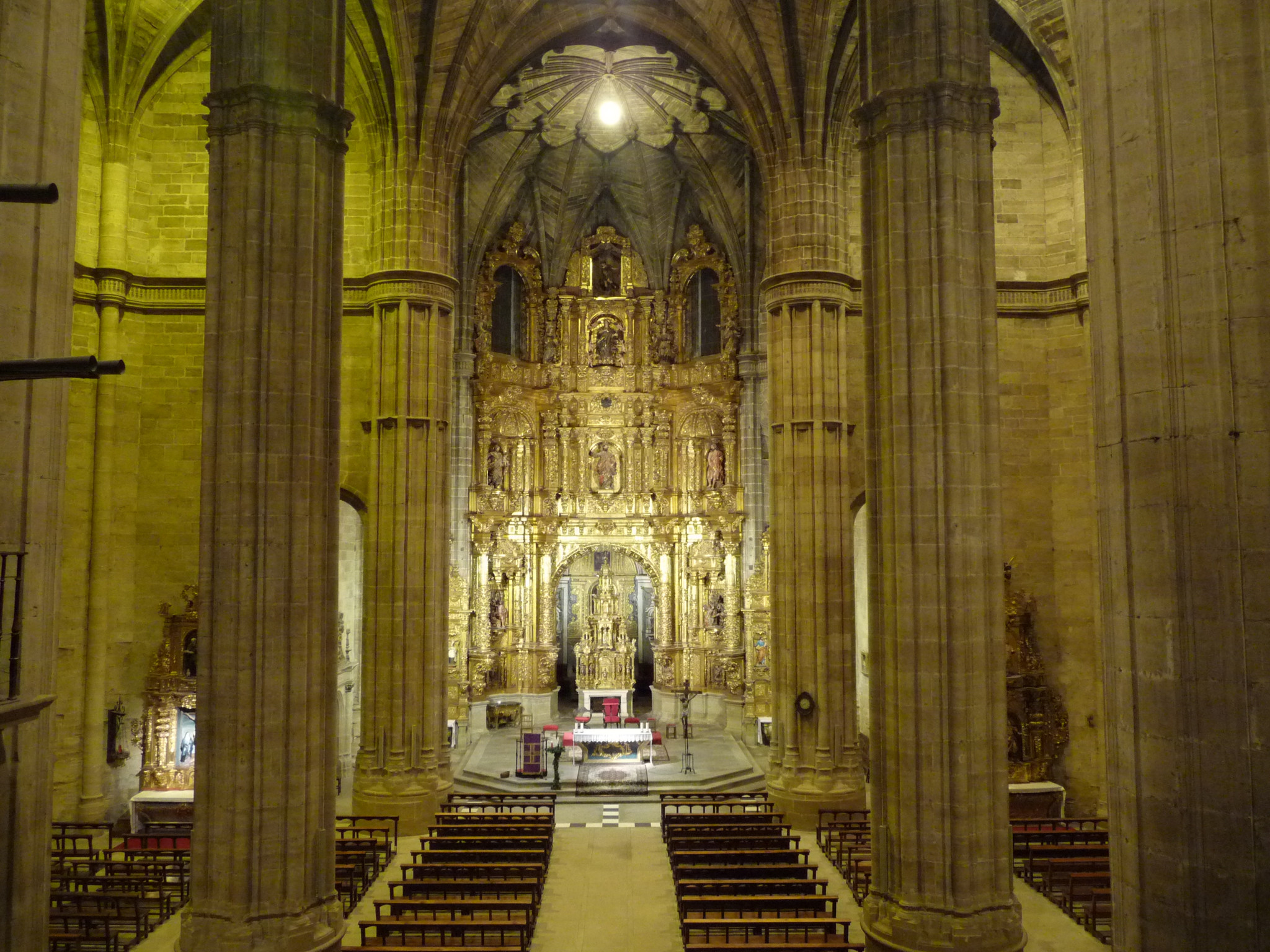 Iglesia de Santo Tomás. Haro, La Rioja (España) - Vista interior general sacada desde el coro